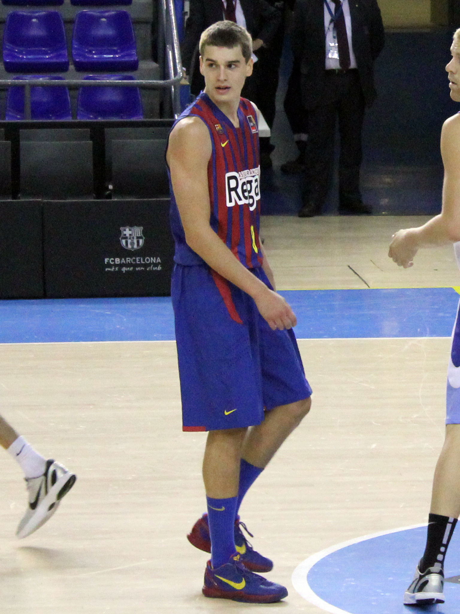 Mario Hezonja - FC Barcelona B